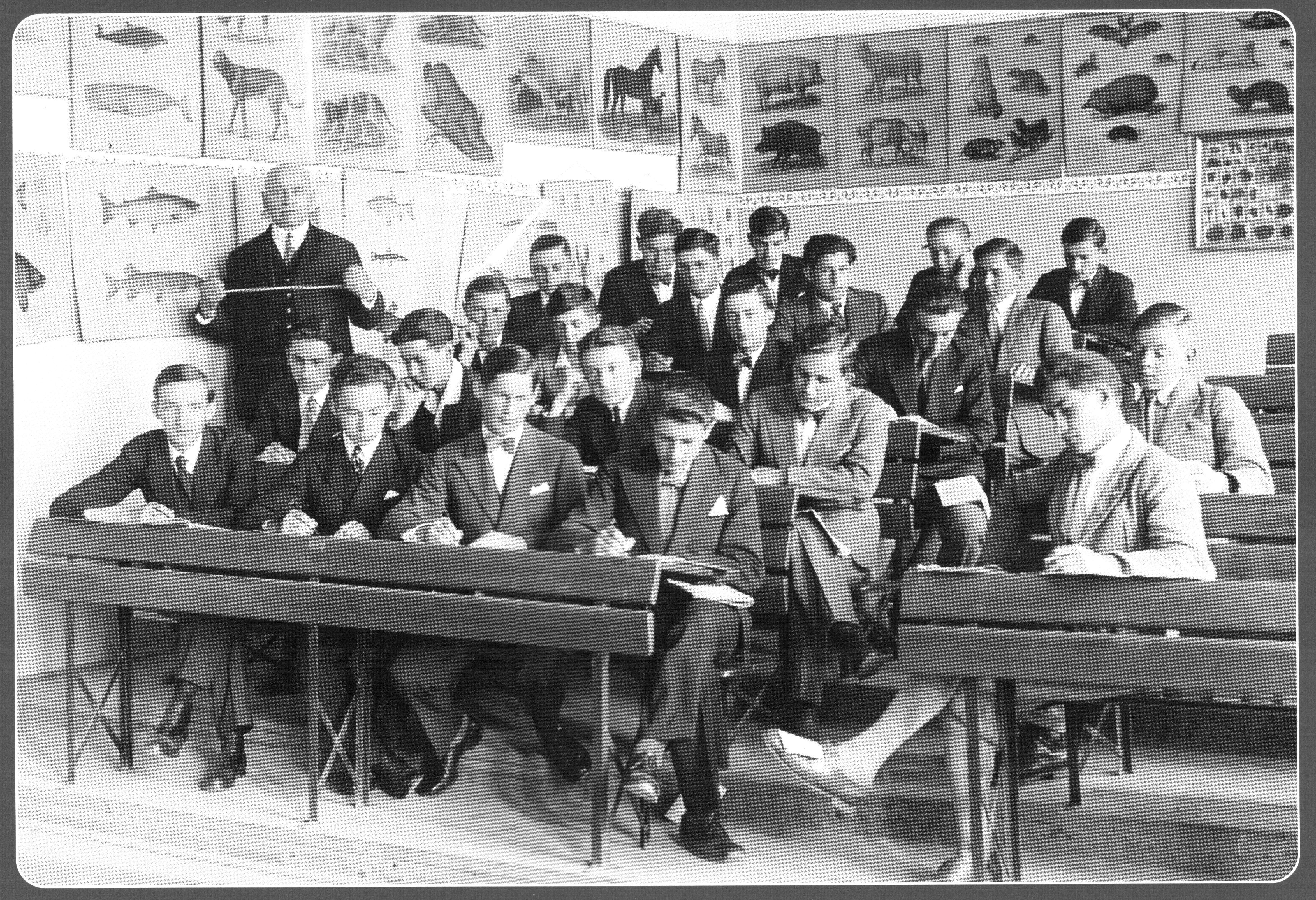 Székelykeresztúr – Unitarian Secondary School, 1933 (9), Last row, from left to right the third Elekes Andor. Források: Bözödi György: Székelyek Turul Sajtóvállalat, Budapest,1943, Vofkori György: Székelykeresztúr képes története Polis, 2012, Kolozsvár ISBN 973 8341 03 5 Apáink arca Veszprém, 2009, ISBN 978 963 06 6757 9 Tags: Székelykeresztúr Betfalva Gyallay-Pap Sándor Elekes Judit